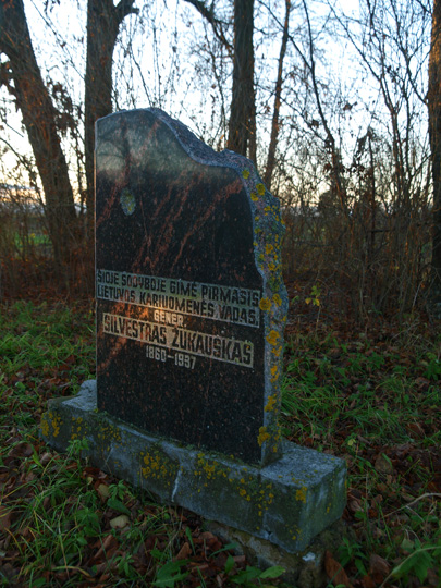 Dovainiškis, Pakruojo rajonas